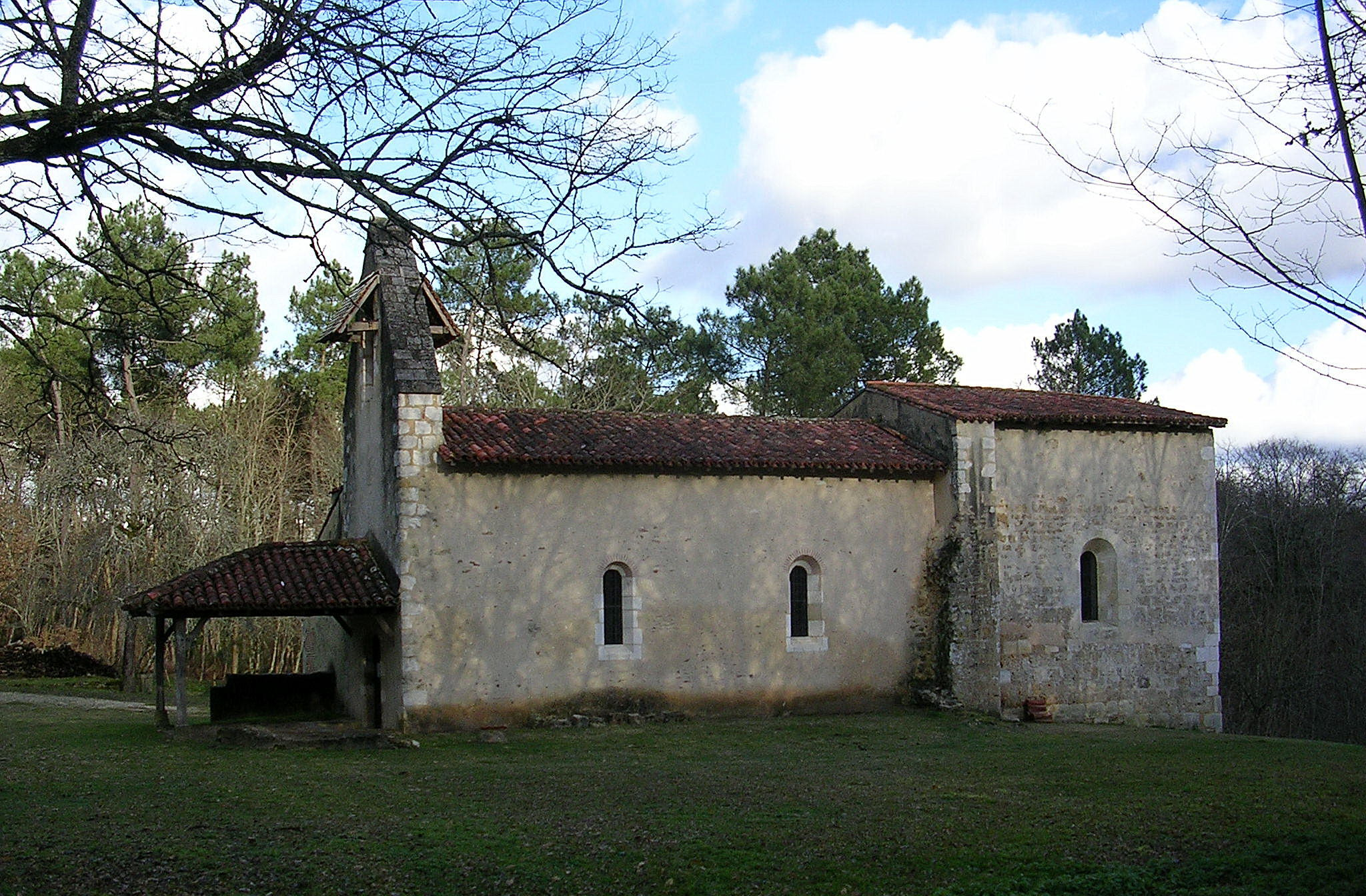 Chapelle de Lugaut, à Retjons, dans les Landes, France. Photo prise par Jibi44 en décembre 2004.